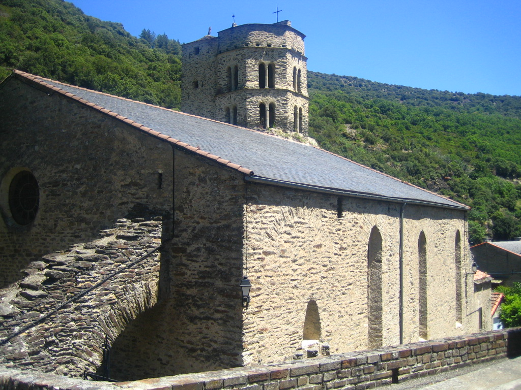 Iglesia de Saint-Etienne, en Mas-Cabardès (Aude, Francia)